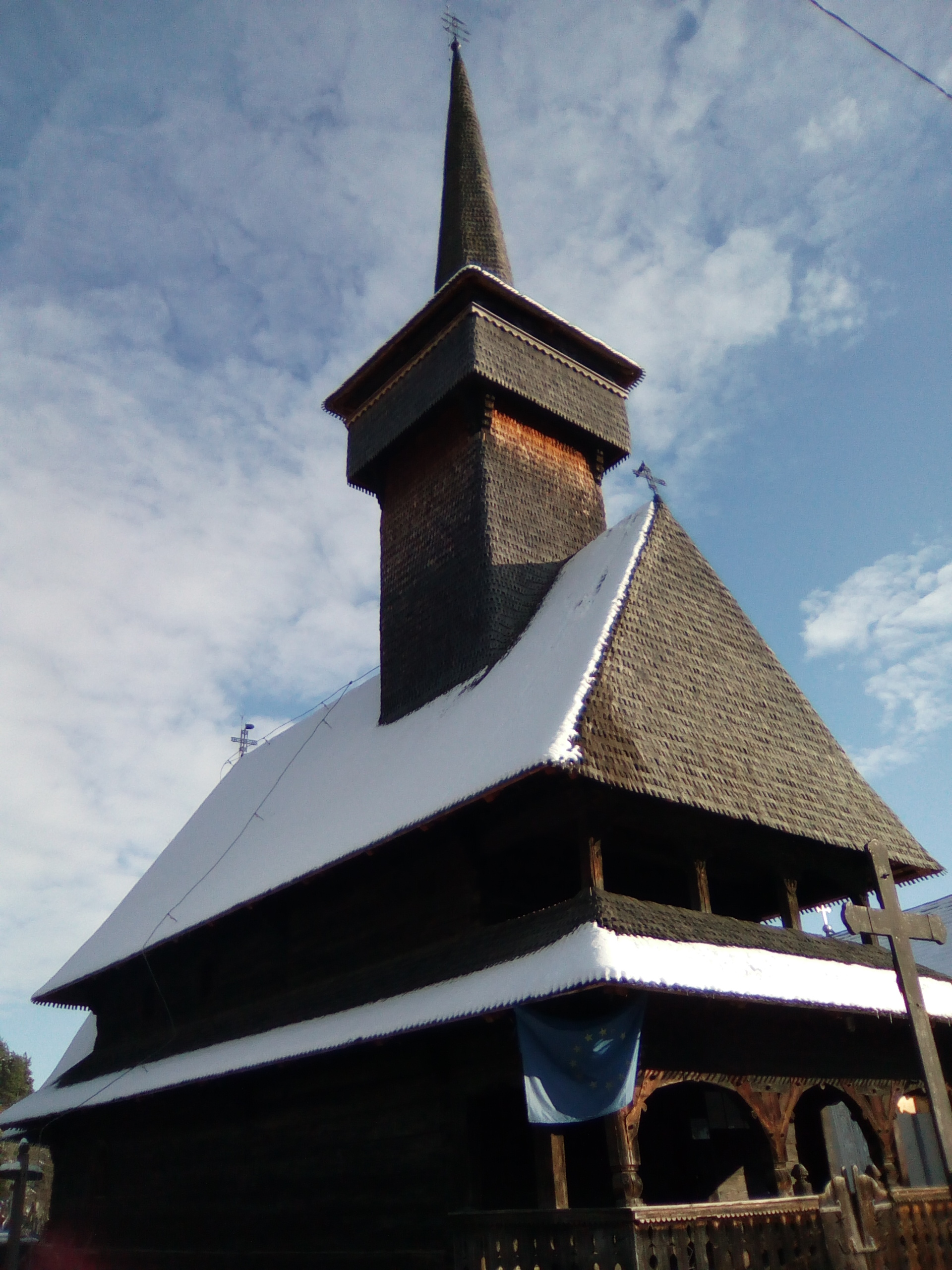 A fost construita in secolul al XVIII-lea.